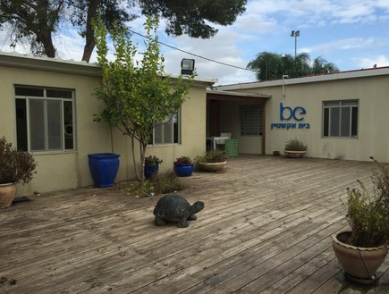 משרדי הנהלה ארגון בית אקשטיין